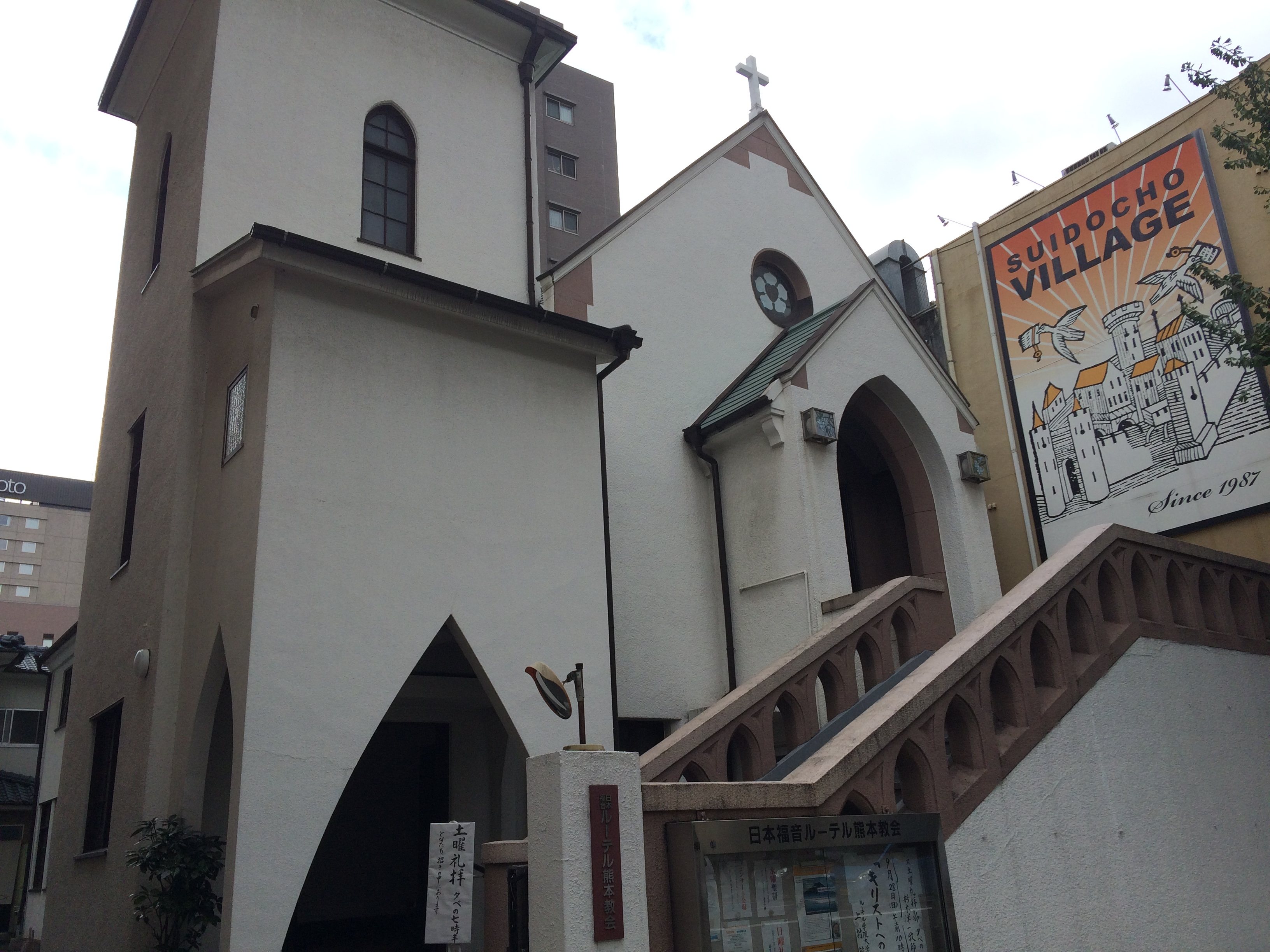 教会の外観